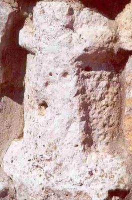 Diosa madre de origen cartagines, en Valdeande